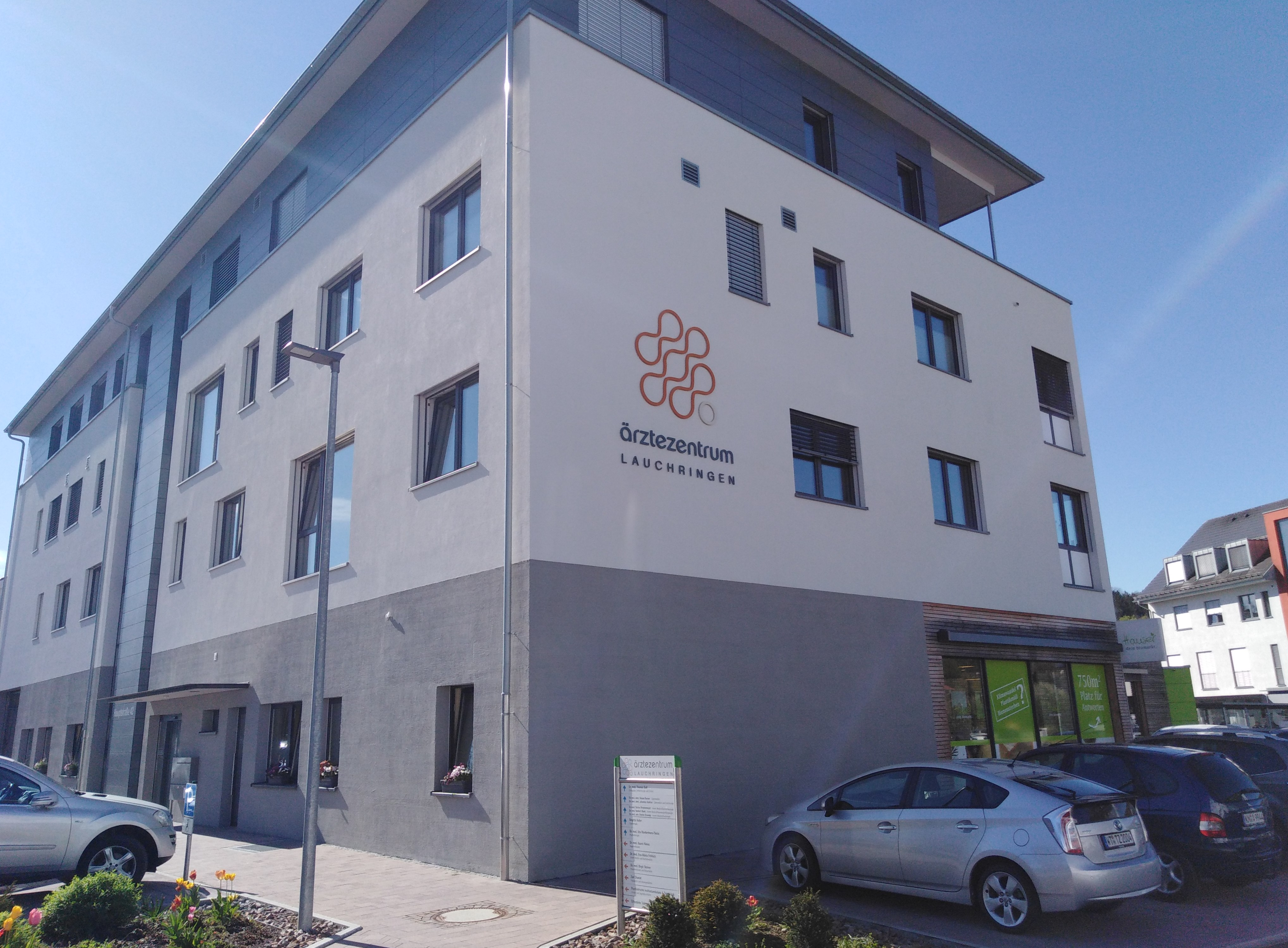 Lauchringen, Gemeinde im Landkreis Waldshut in Baden Württemberg. Das Ärztezentrum in Unterlauchringen.